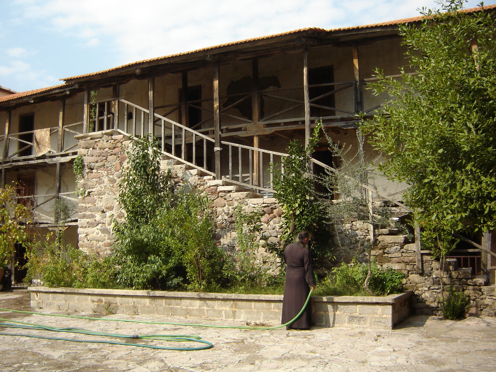 Courtyart of the monastery of Limonos, Lesbos, Greece